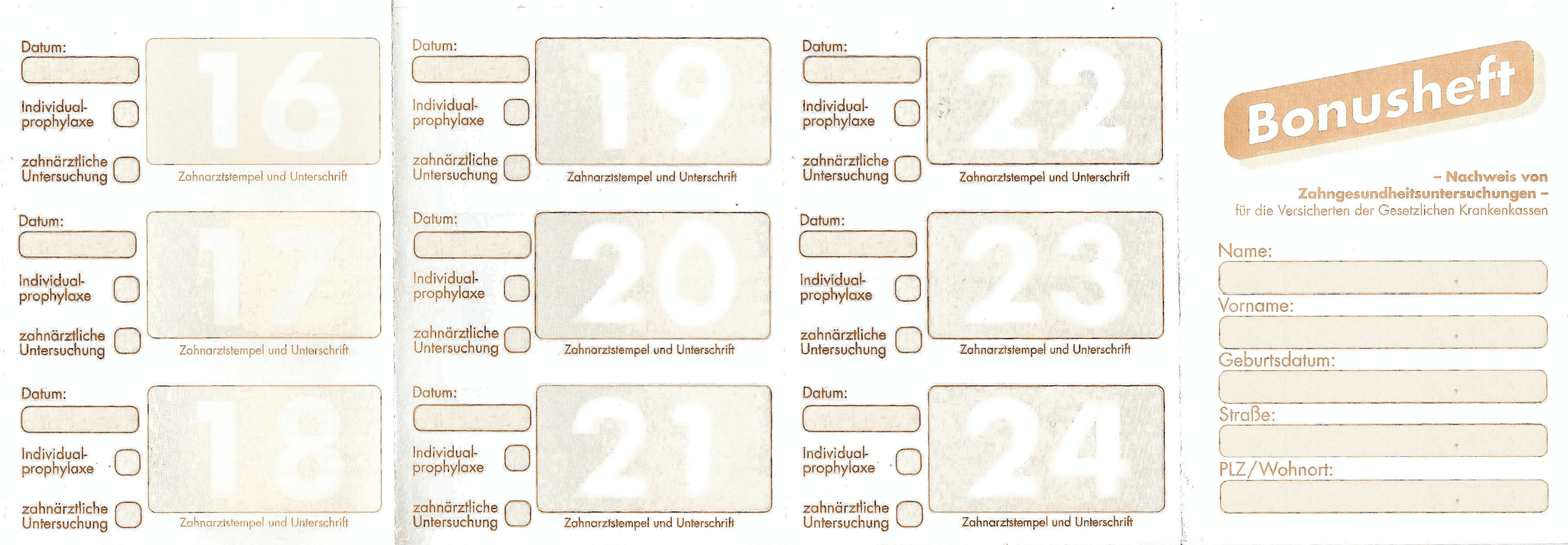 Bonusheft, Zahnersatz, Zahnarzt, Krankenkasse